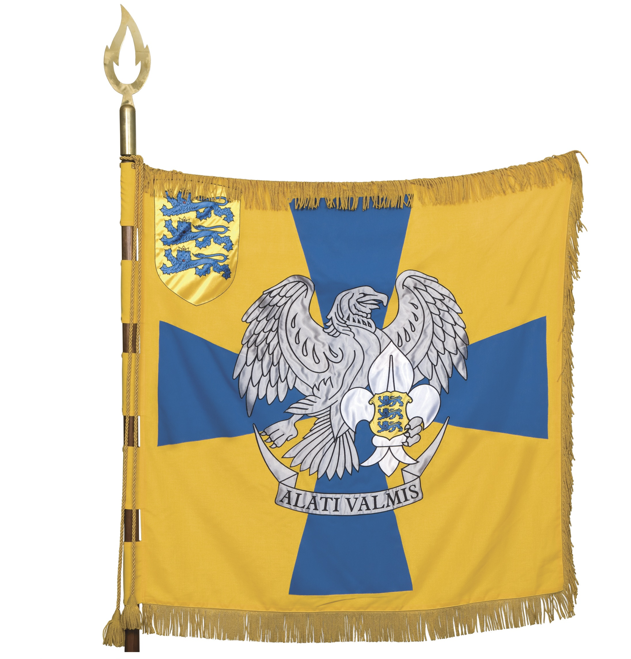 Noorte Kotkaste Tallinna maleva lipp